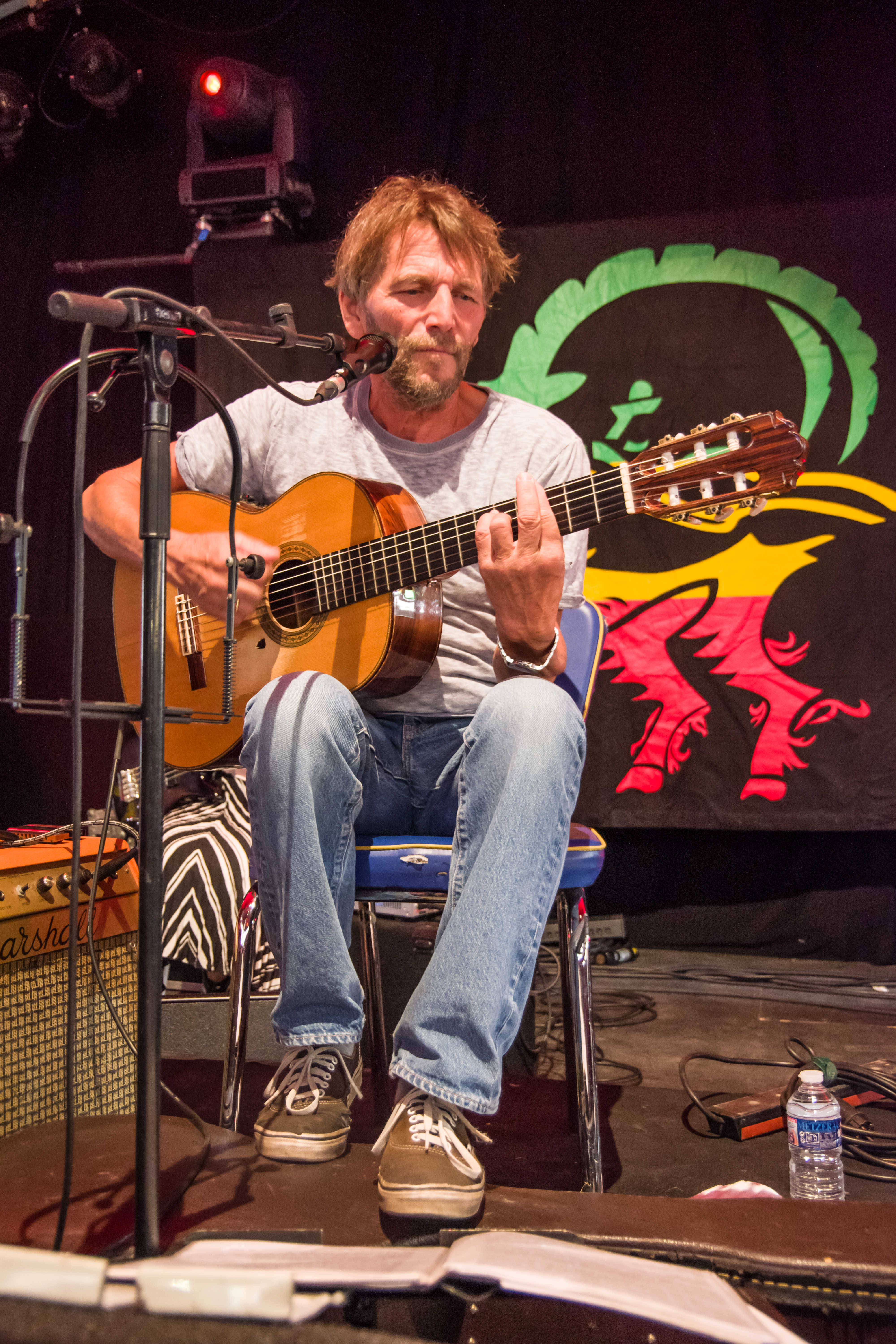 Das Zelt-Musik-Festival 2018 in Freiburg im Breisgau 23.07.2018 Hans Söllner und Bayaman'Sissdem